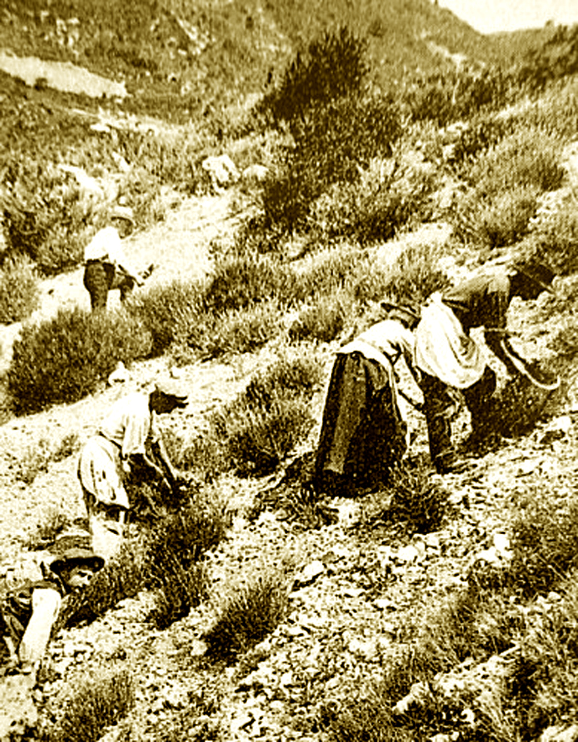 Récolte de la lavande sauvage